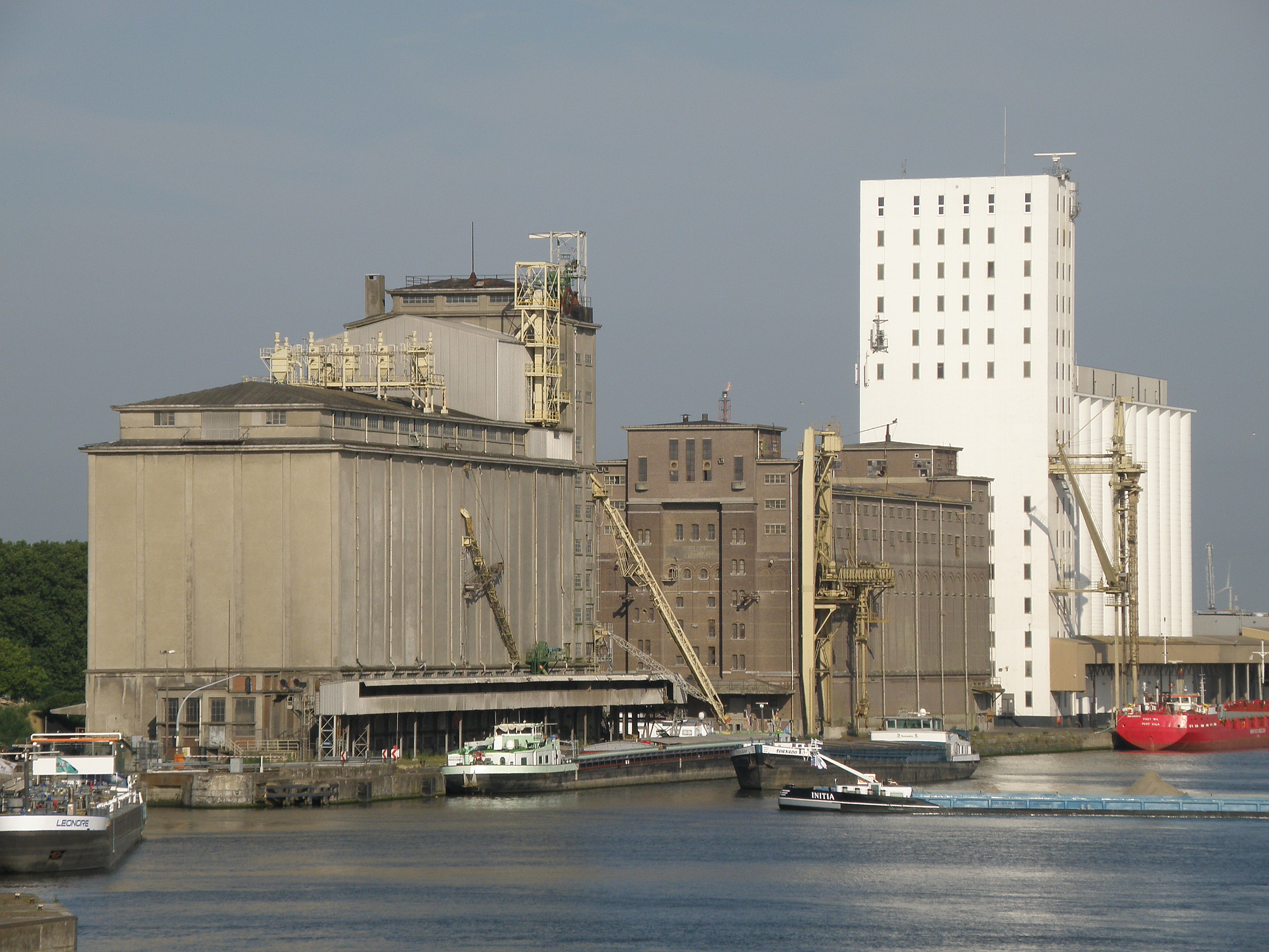 Antwerpen. Amerikadok.